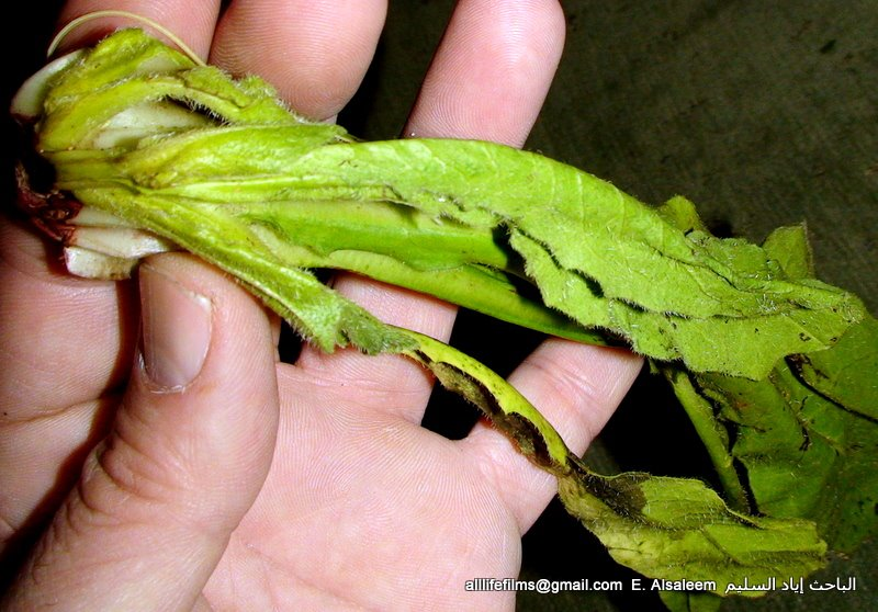 نباتات برية سورية تؤكل